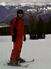 Man using Salomon Snowblades